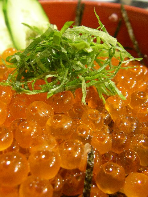 @ 築地「マックモア」Ikura (Salmon caviar)